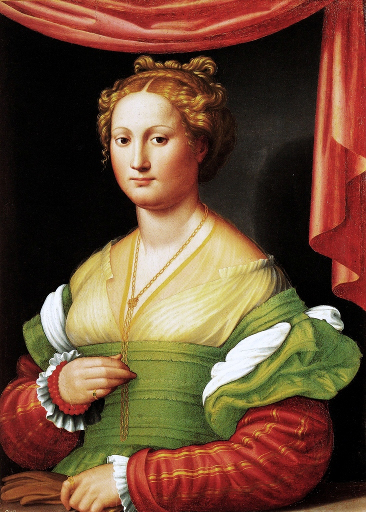 (Possibly Vannozza Cattanei)